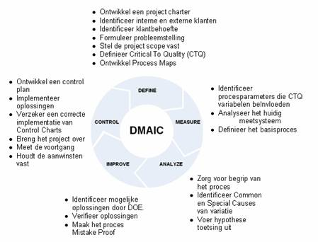 dmaic